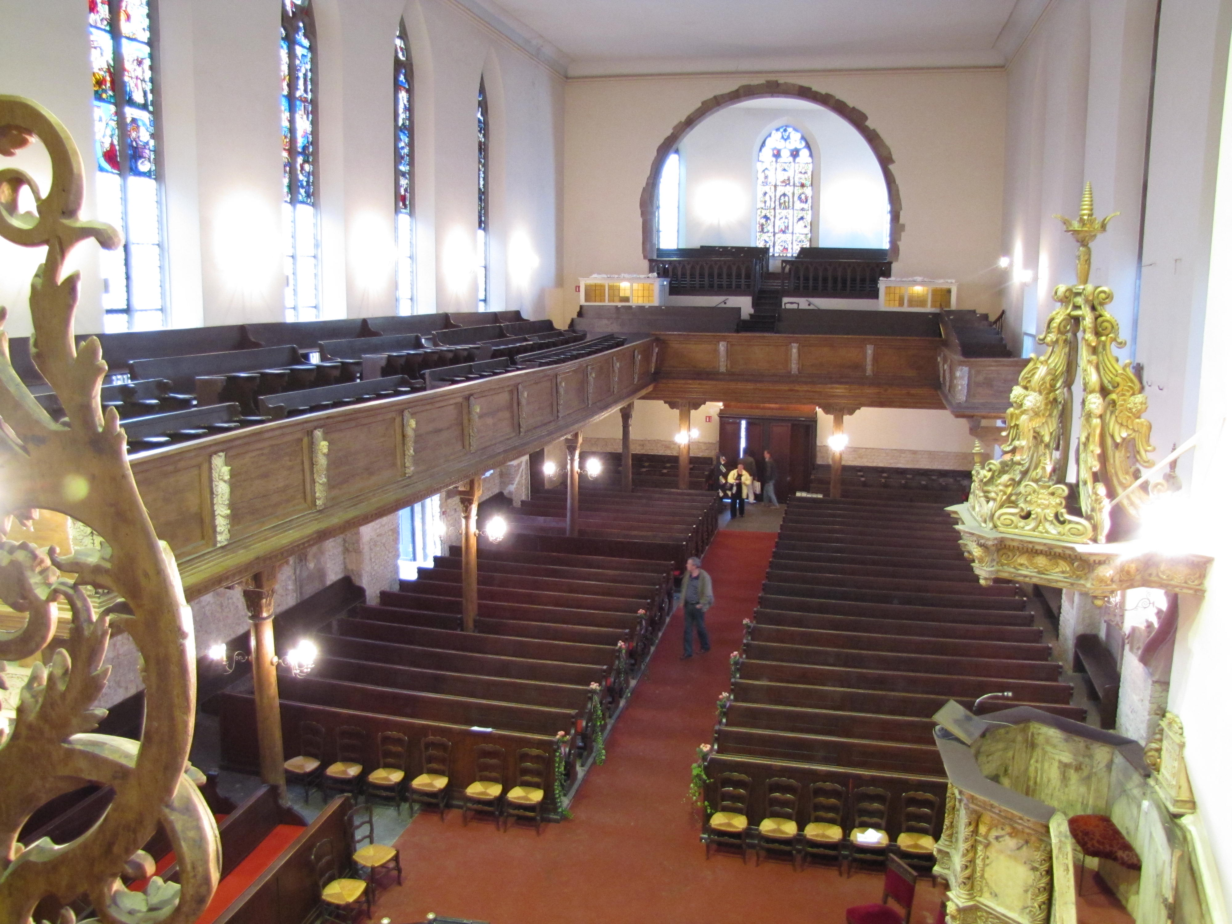 Alsace, Bas-Rhin, Église protestante Saint-Guillaume de Strasbourg (PA00085026): Vue de la nef à partir du jubé vers la galerie de paroissiens.